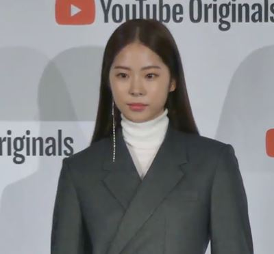 29일 오후 서울시 영등포구 여의도 '콘래드호텔'에서 유튜브 오리지널(YouTube Originals) '탑매니지먼트(TOP MANAGEMENT)' 제작발표회가 열렸다. 이날 차은우, 안효섭, 서은수, 방재민, 정유안이 참석해 포토타임을 갖고 있다.